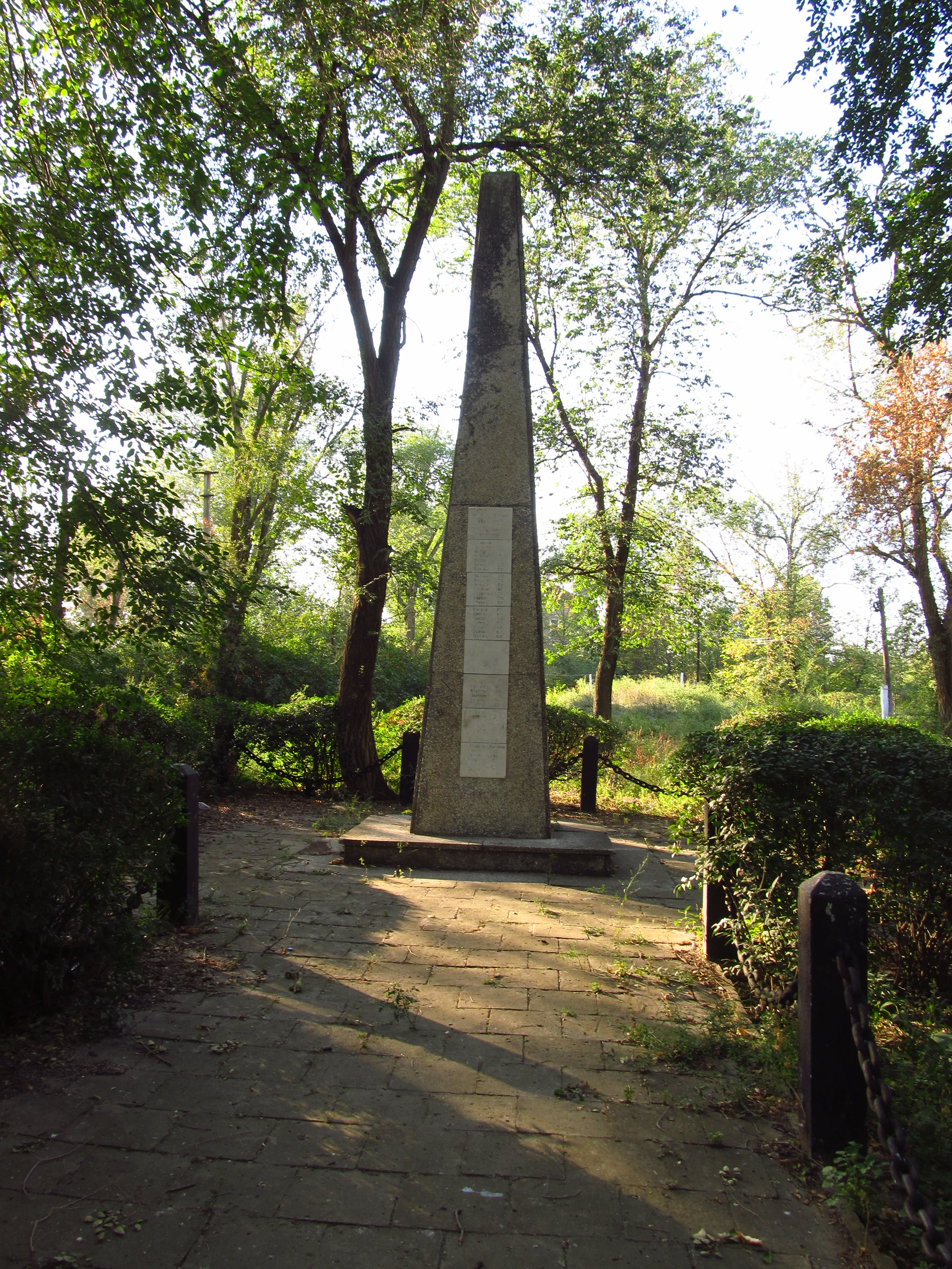 Пам’ятник воїнам-односельцям, загиблим в роки І світової війни, с. Холмське, в центрі села у парку